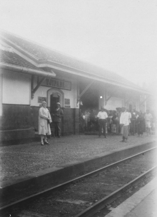 Foto. Peron stasiun kereta api Tjipari (Cipari)